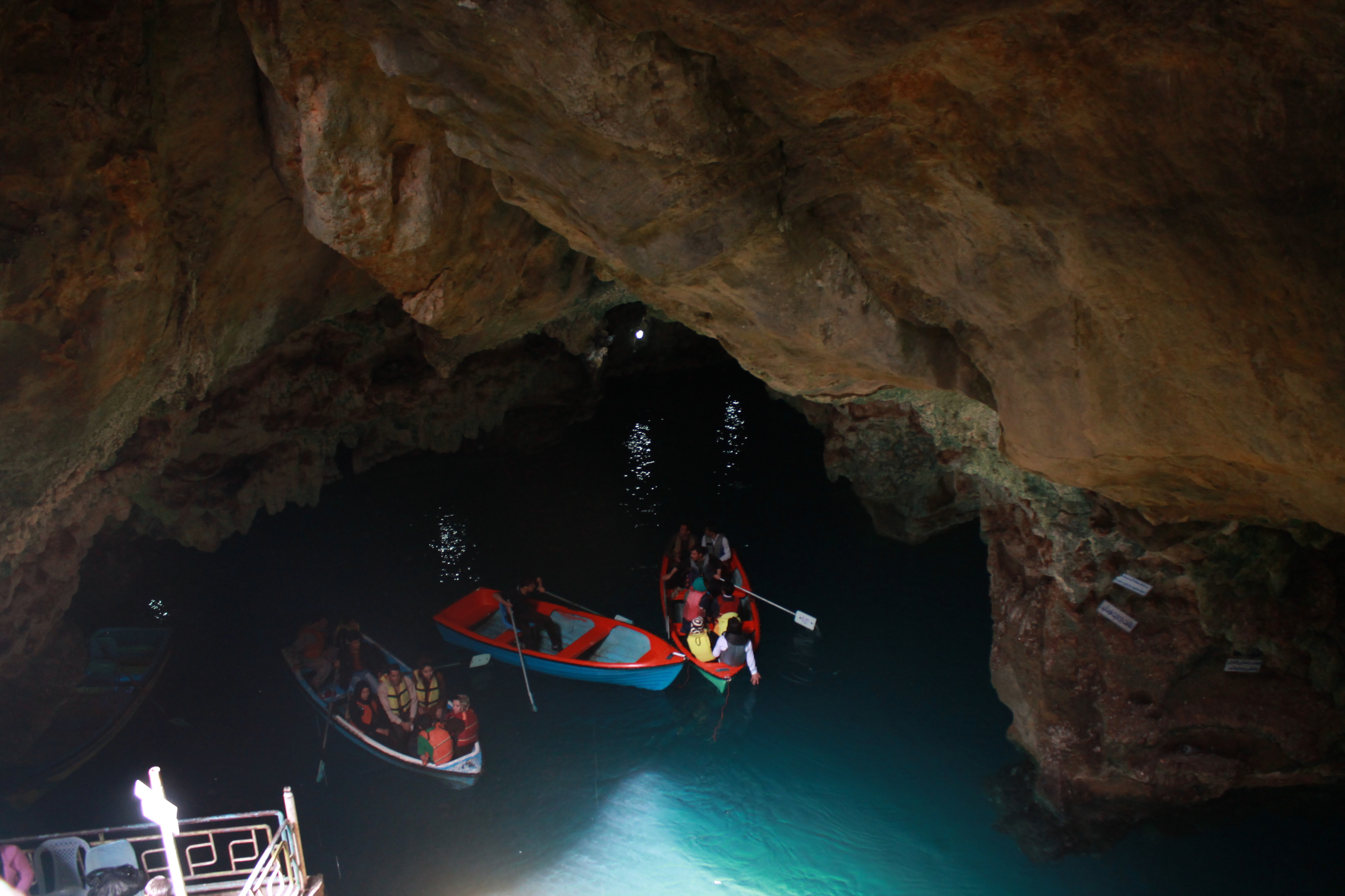 غار آبي سهولان